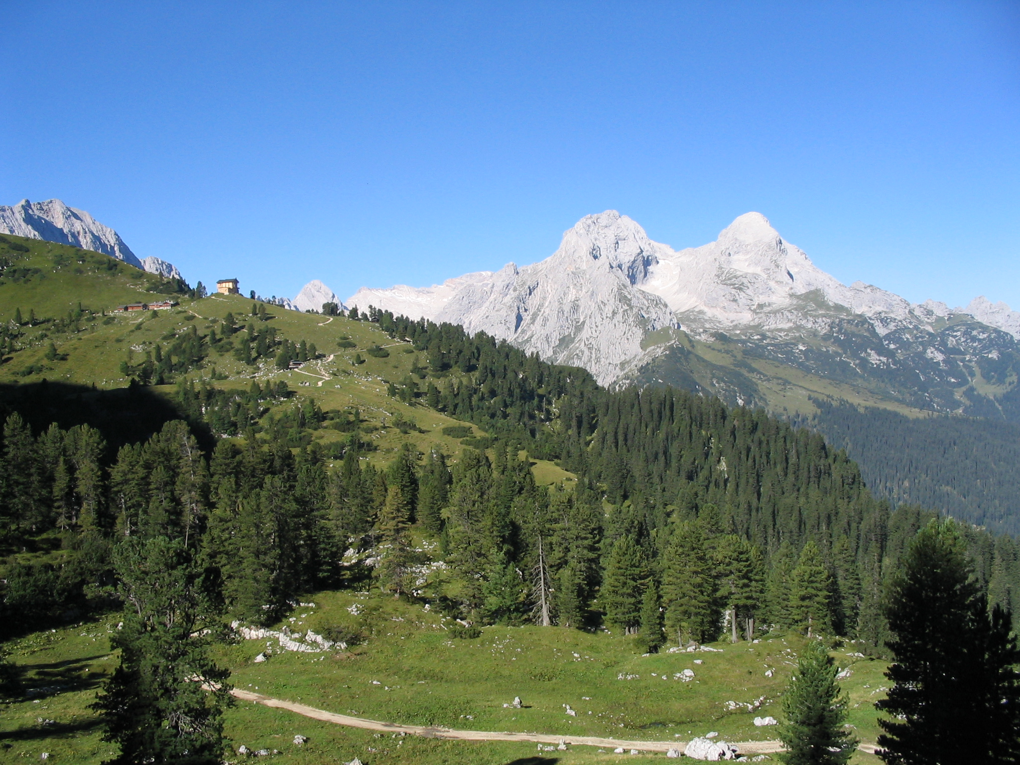 Blick zum Schachen